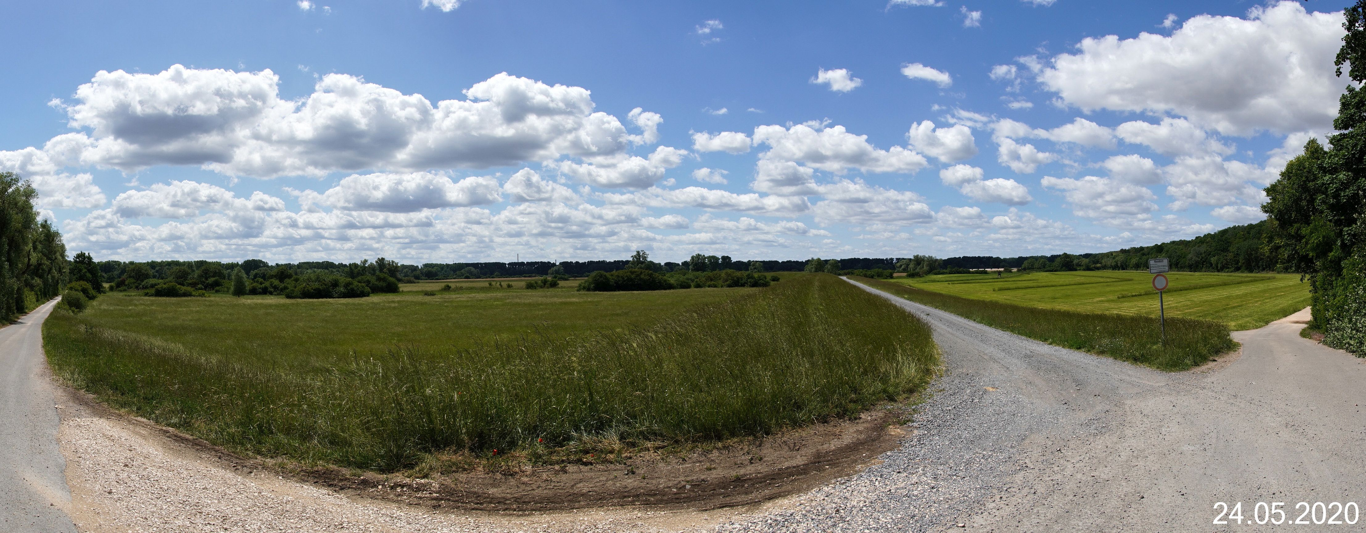 Panoramaaufnahme der Insel Flotzgrün